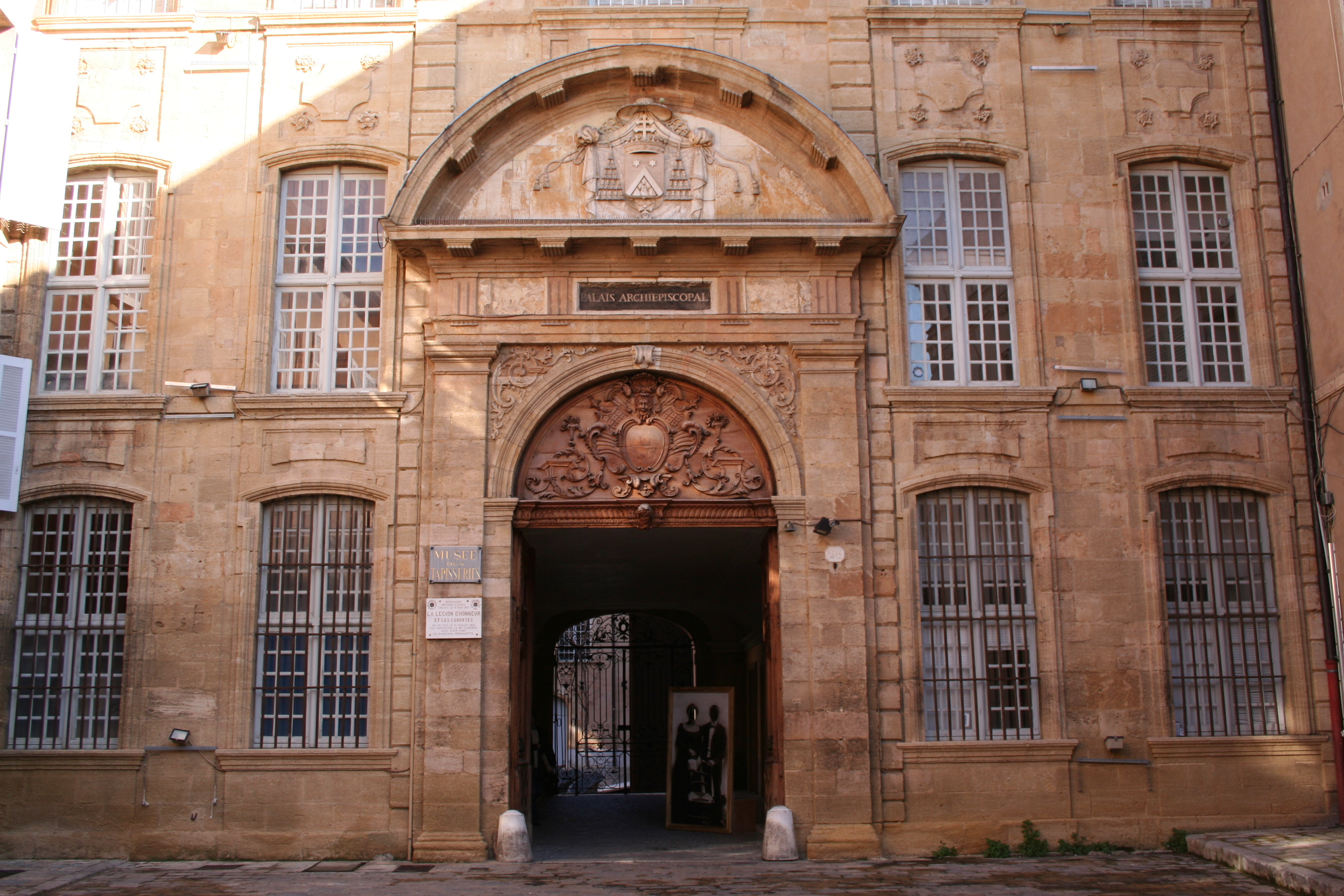 Musée des tapisseries, Aix-en-Provence (France).